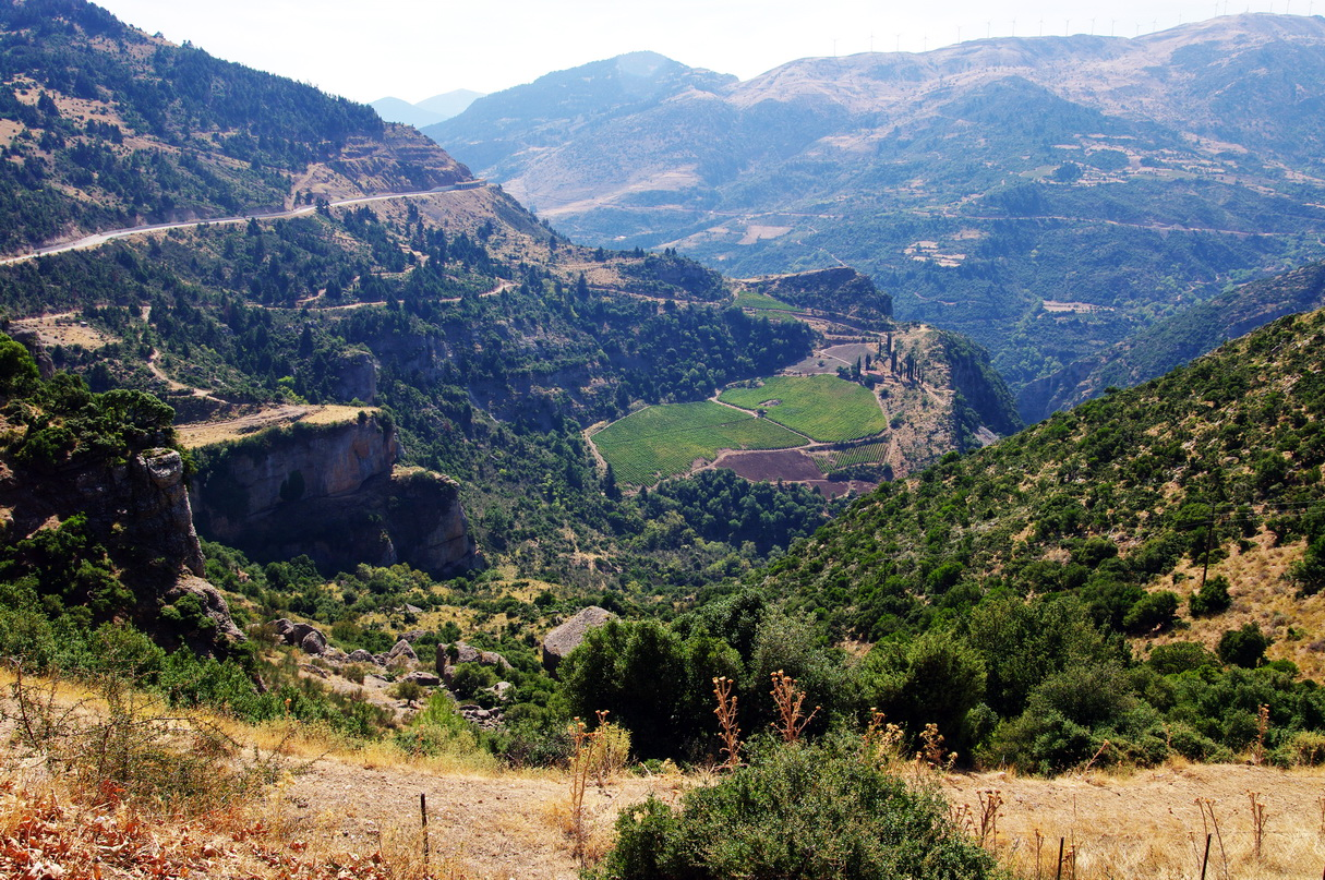 Vouraikos-Tal